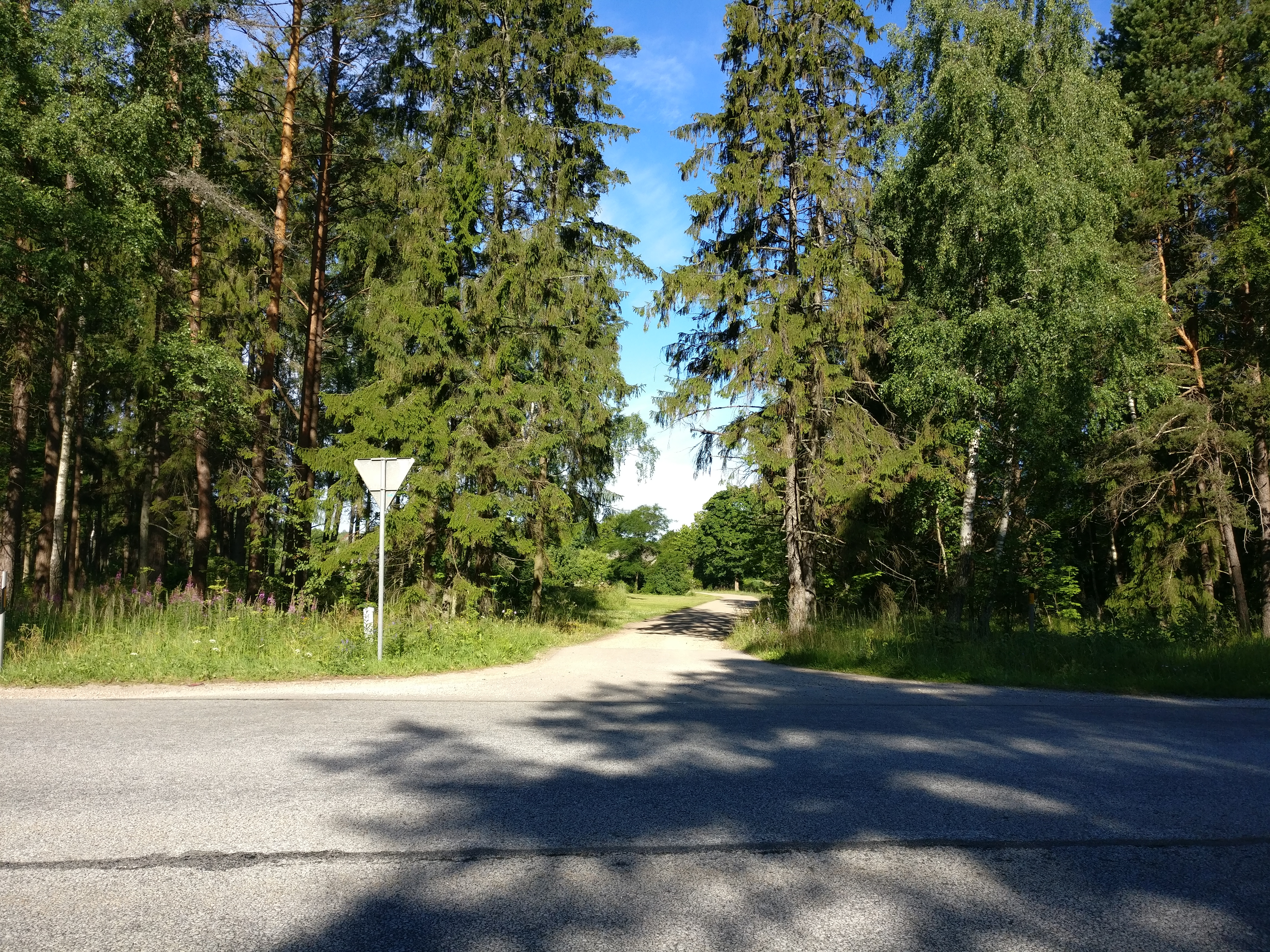 Kumpāni (mazciems)